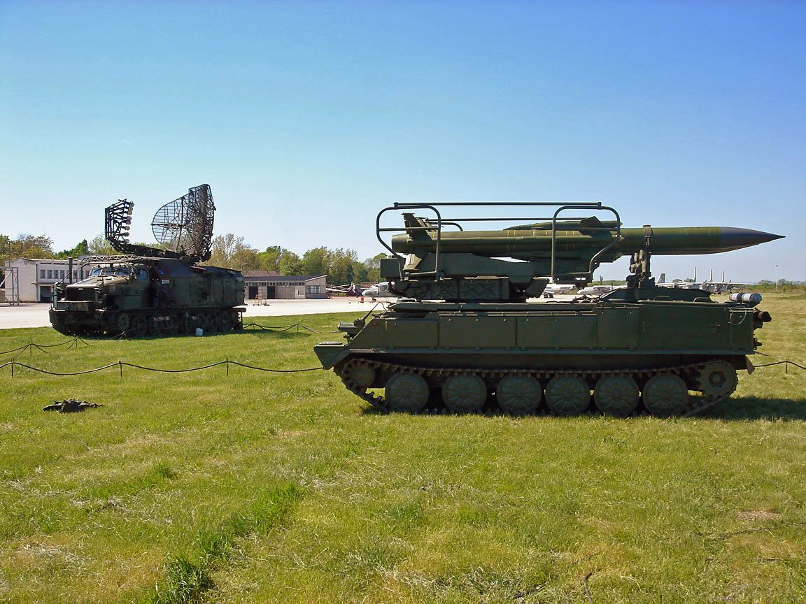 Kub Mi